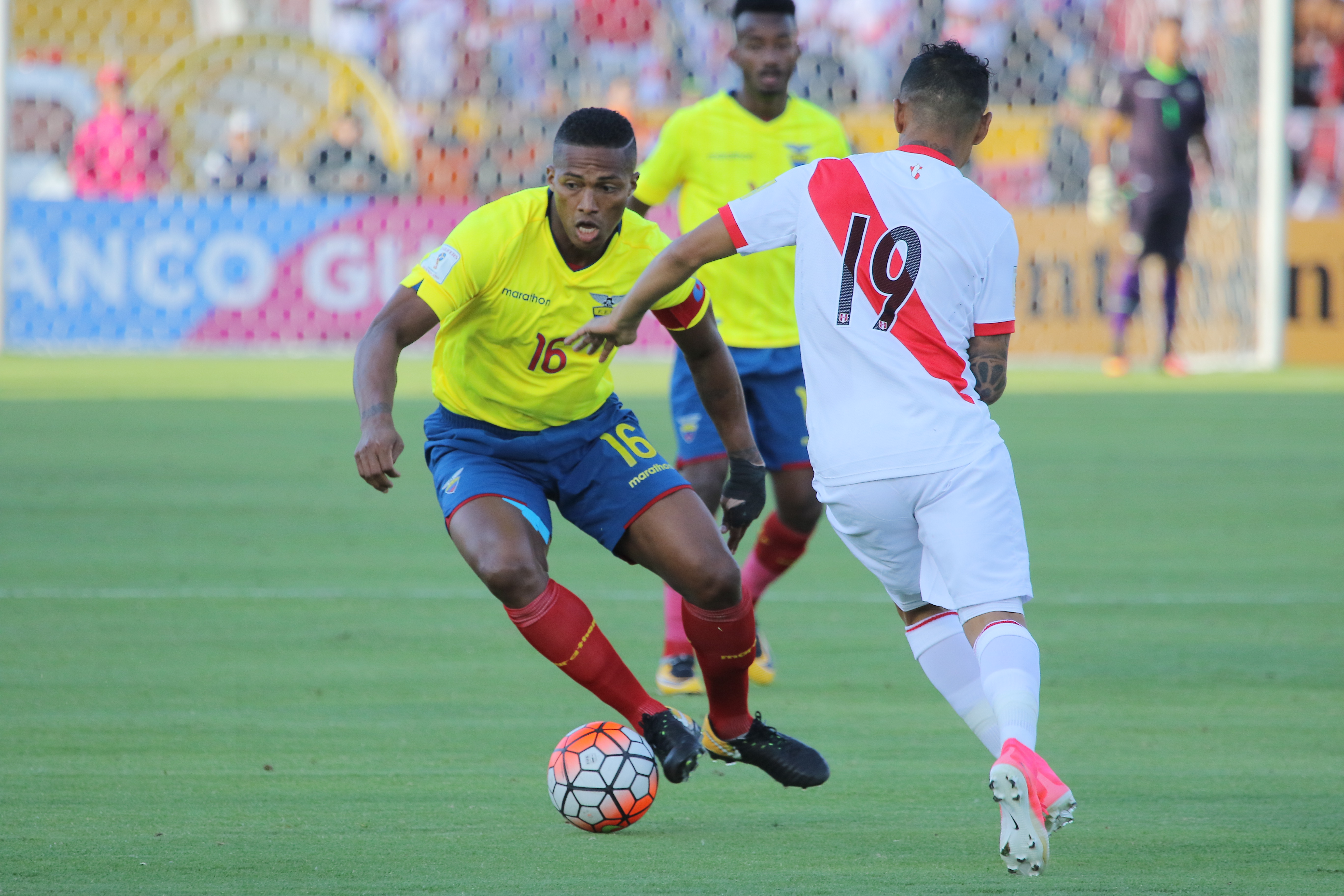 Quito 5 Sep (Andes).- Encuentro por eliminatorias Rusia 2018 entre Ecuador y Perú. Fotografías: Carlos Rodríguez/Andes.